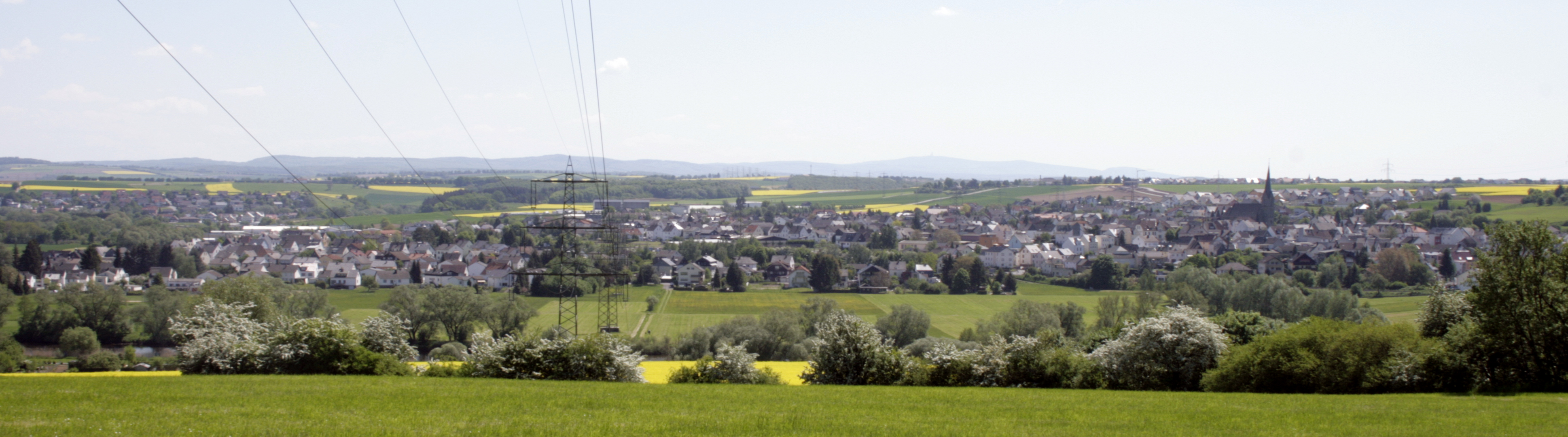 Ortsansicht von Eschhofen, Deutschland, von Norden aus gesehen